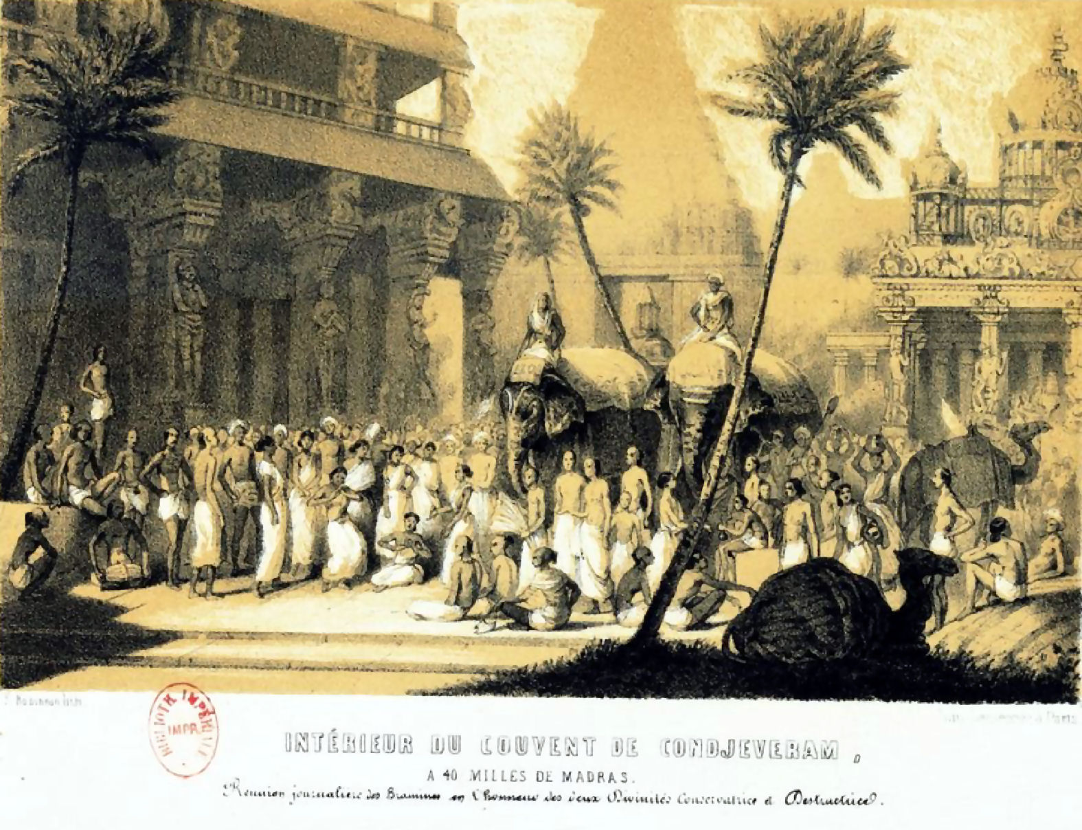 Intérieur du couvent de Condjeveram, lithographie à deux teintes illustrant les "Voyages dans l'Inde" (3e édition) de Alexei Saltykov